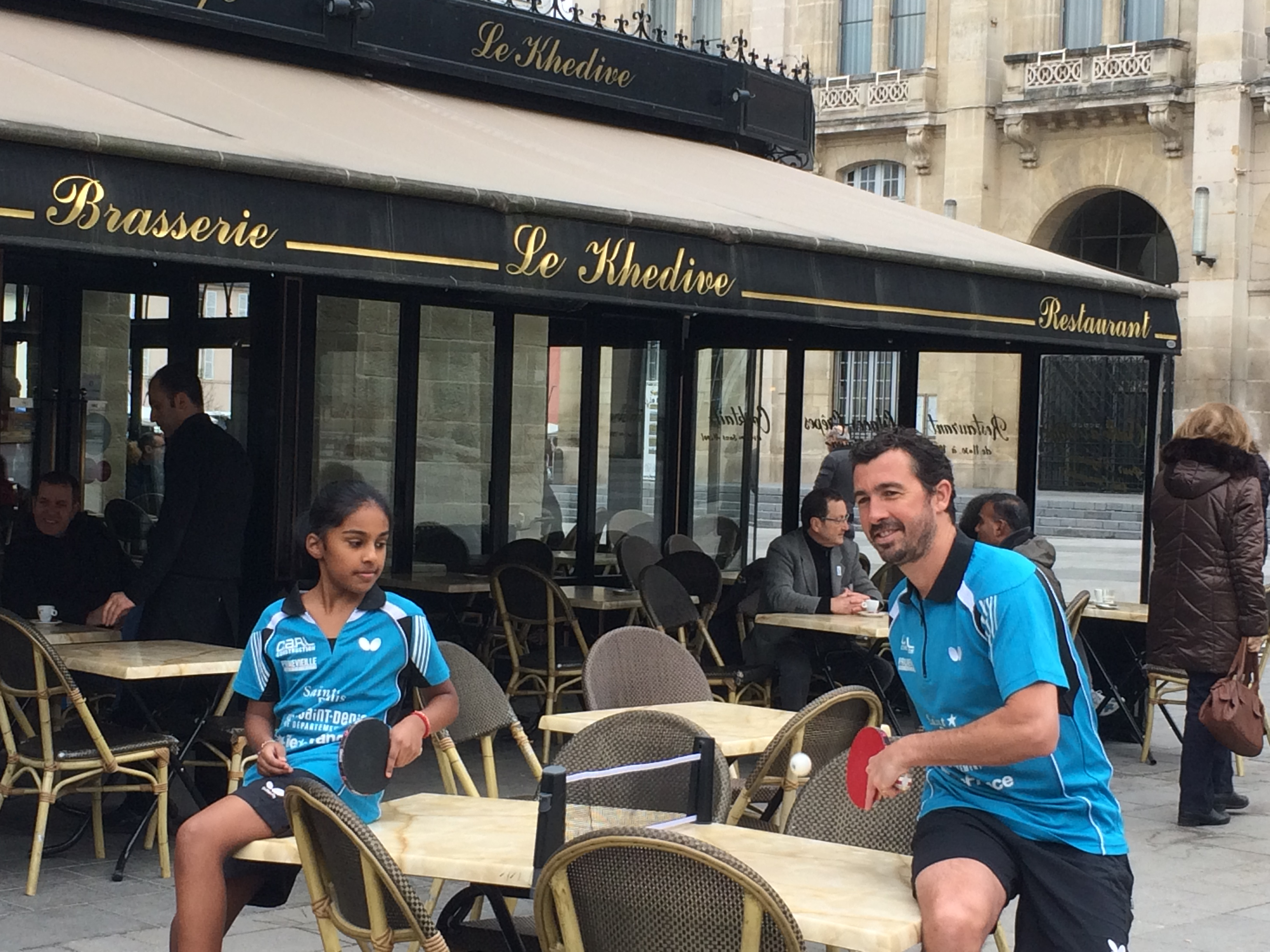 La joue.use de tennis de table française Prithika Pavade (à gauche) près de l'Hôtel de ville de Saint-Denis (au fond)